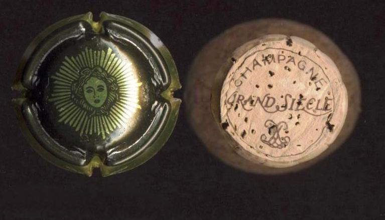 Capsule de bouteille de champagne et son bouchon. Laurent Perrier cuvée Grand siècle. Image saisie au scanner.